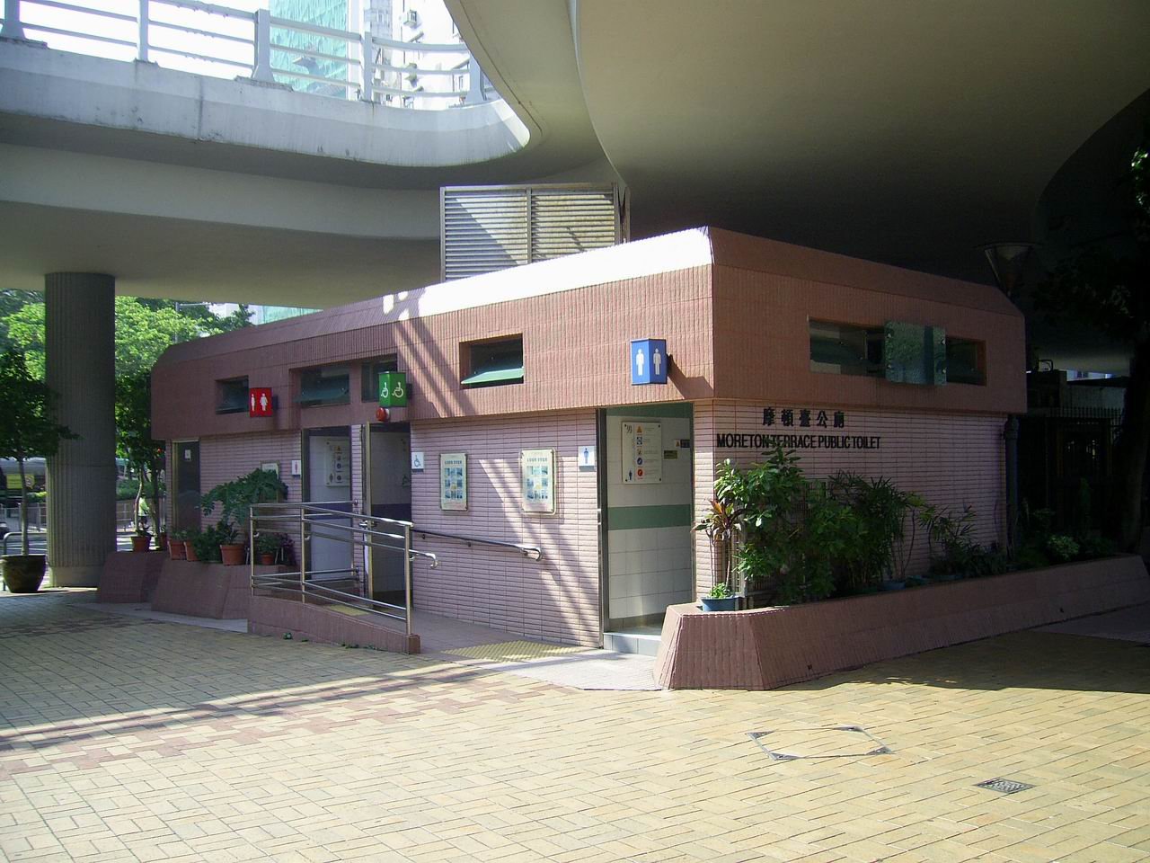 中文（香港）: 摩頓臺公廁